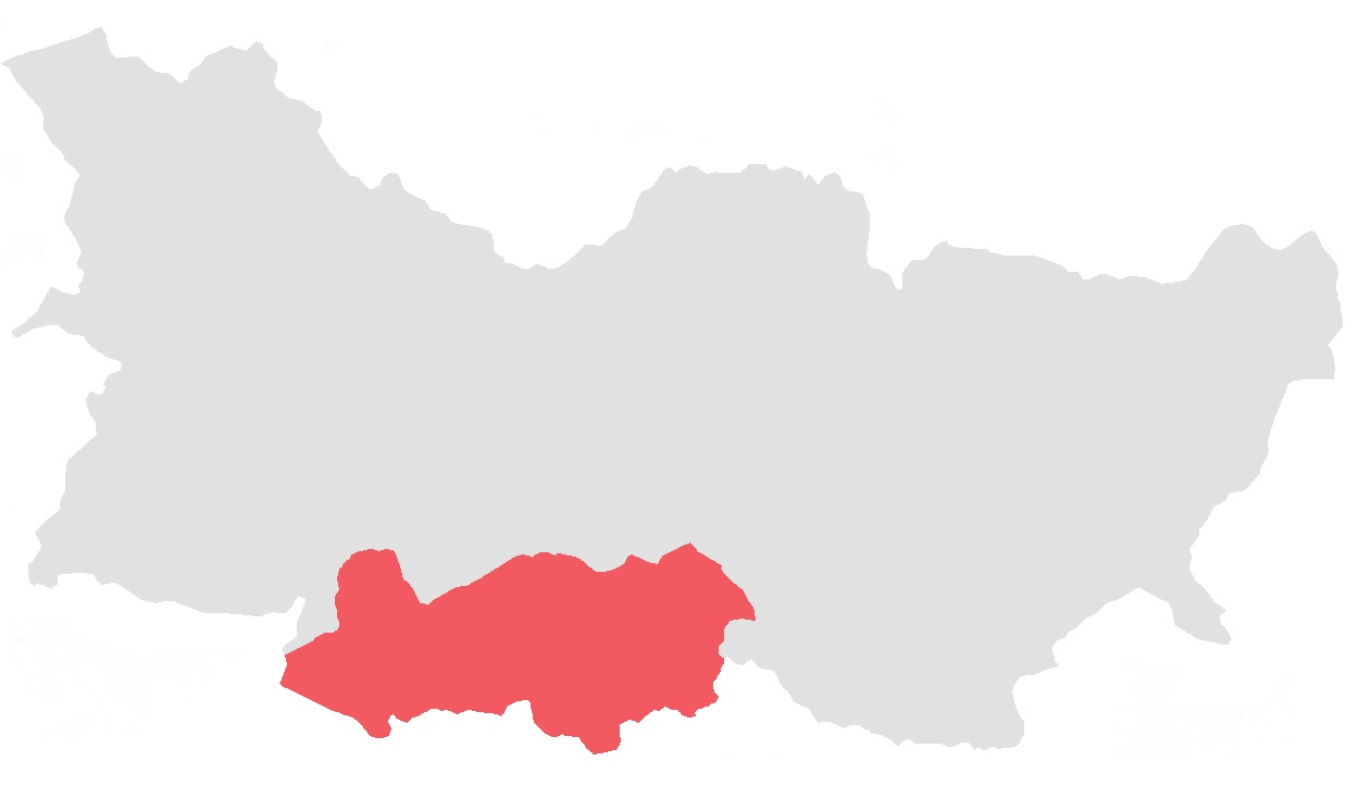 沧源佤族自治县勐董镇位置图